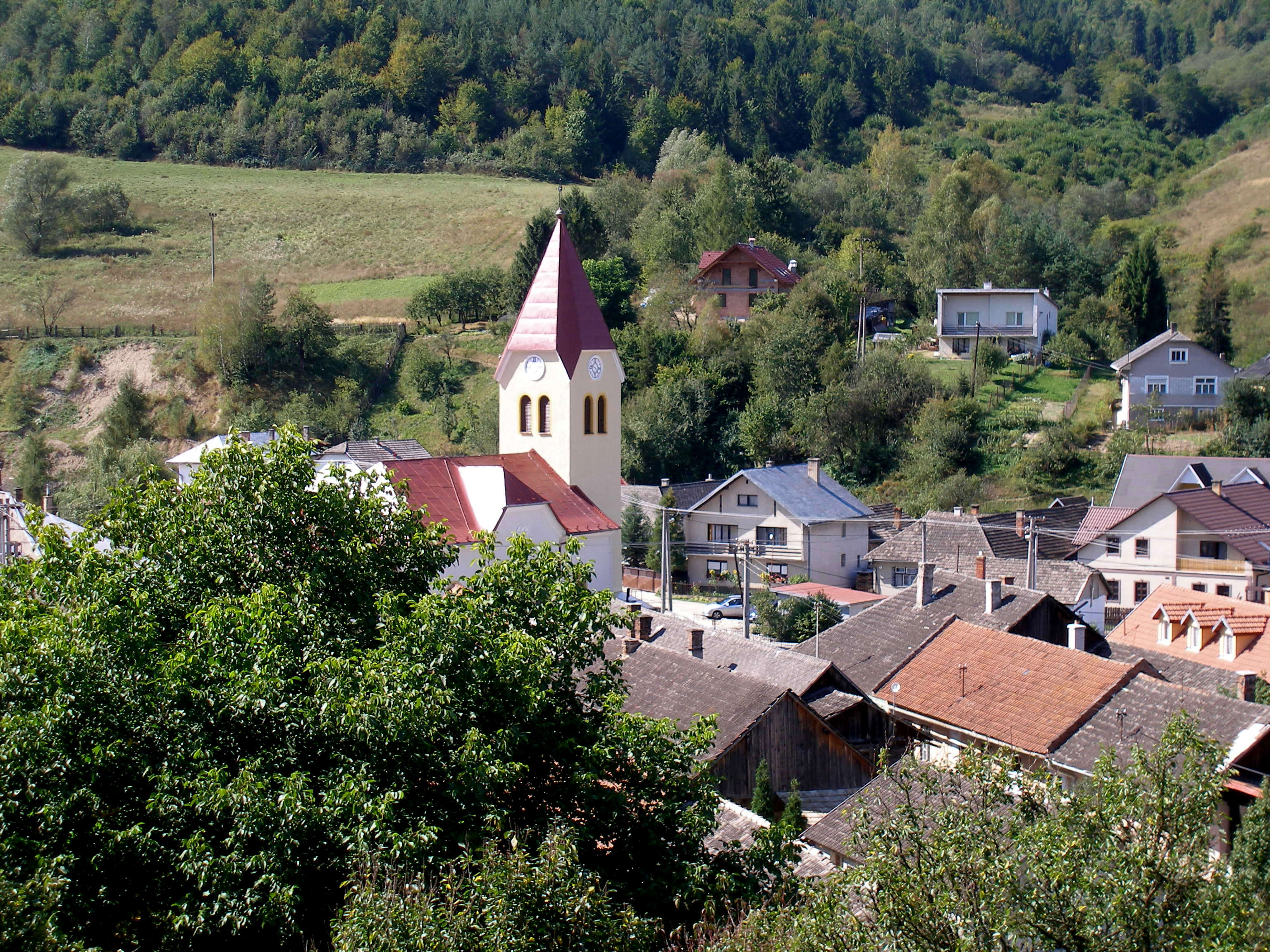 Spišská obec Veľký Folkmar. Okres Gelnica.